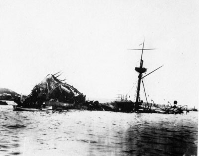 USS Maine (ACR-1)